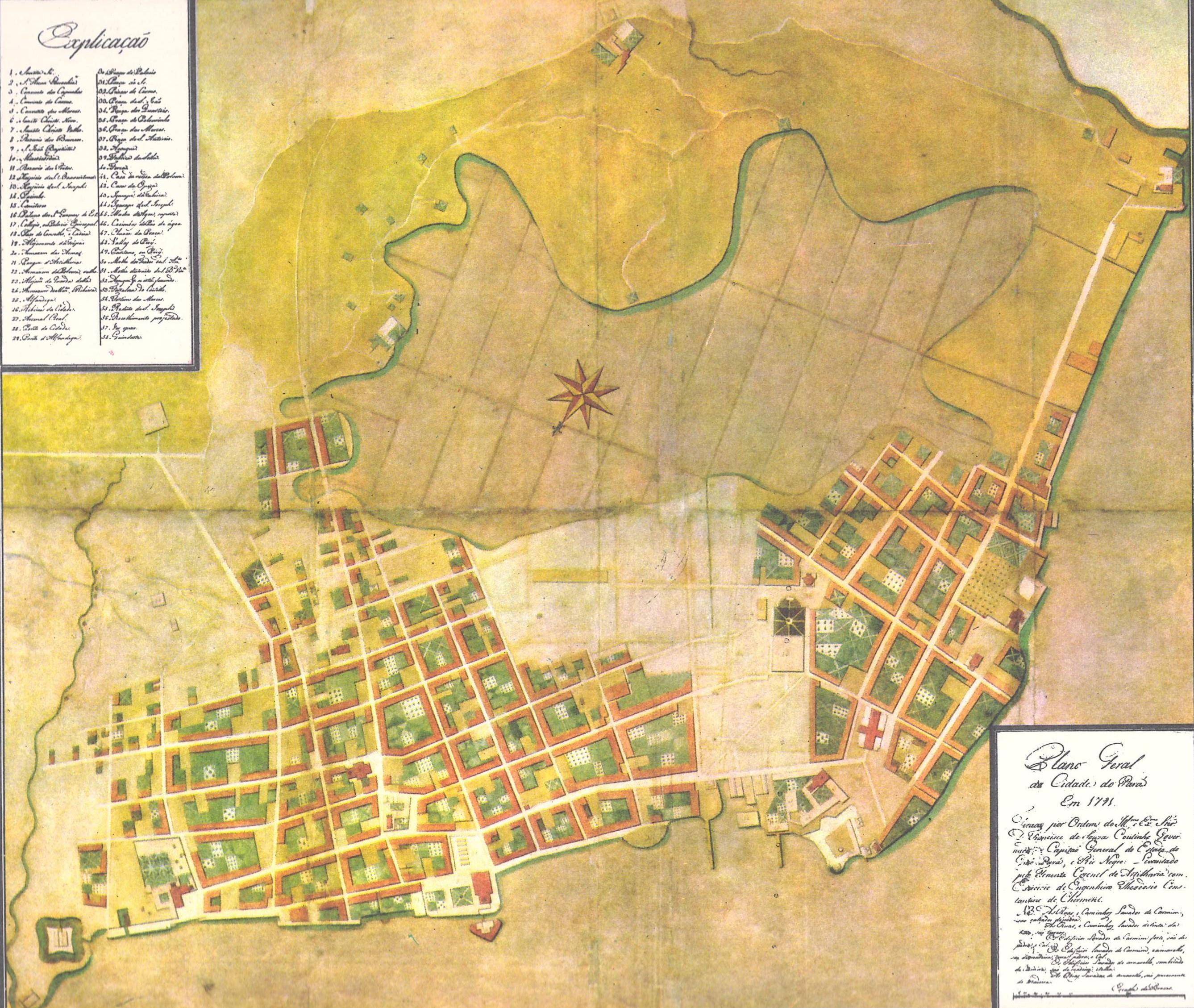 Ilustração em Viagem Filosófica pelas capitanias do Grão Pará, Rio Negro, Mato Grosso e Cuiabá.